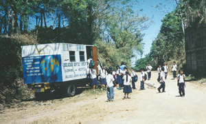 Bücherbus in Nicaragua e.V. Bertolt Brecht Kinderbuchausleihe auf dem Lande